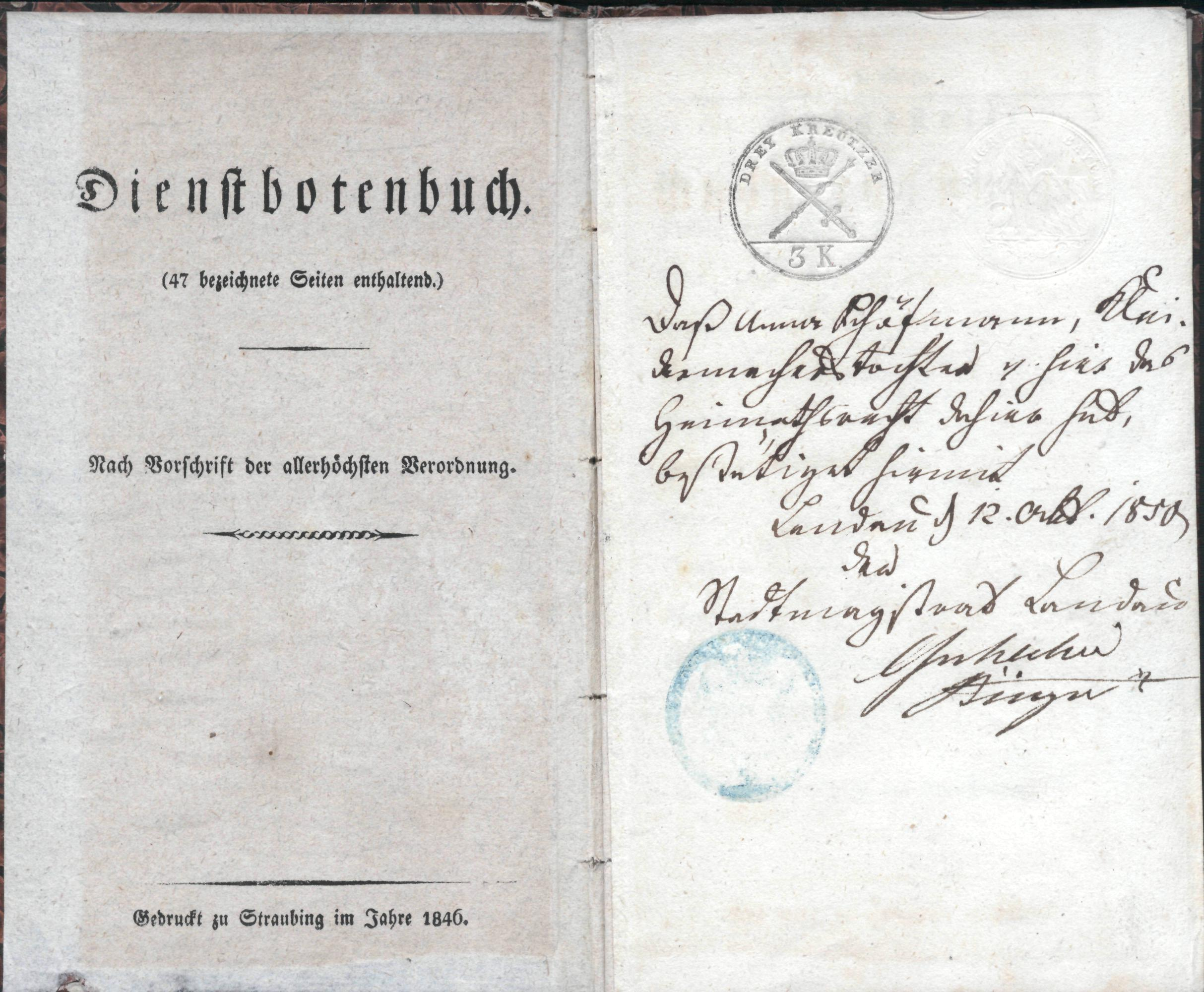 de: Dies ist ein Scan des Dokuments: en: This is a scan of the historical document: Dienstbotenbuch, Formularbuch gedruckt Straubing 1846, benutzt 1850–1852 für die Dienstbotin Anna Schöfmann aus Landau (Pfalz), mit einer einzigen Diensteintragung